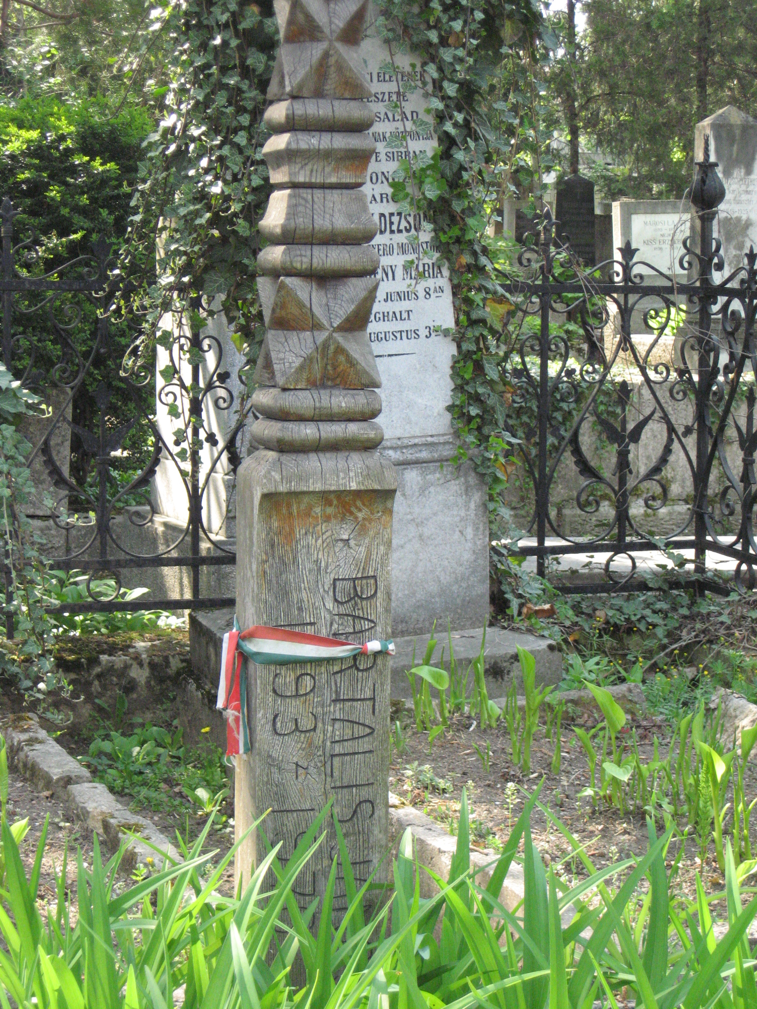 Bartalis János sírja a kolozsvári Házsongárdi temetőben.